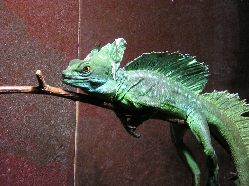 Iguane à Pairi Daiza